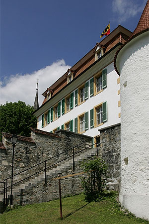 Le Château de Moutier (Préfecture et le Tribunal de district)